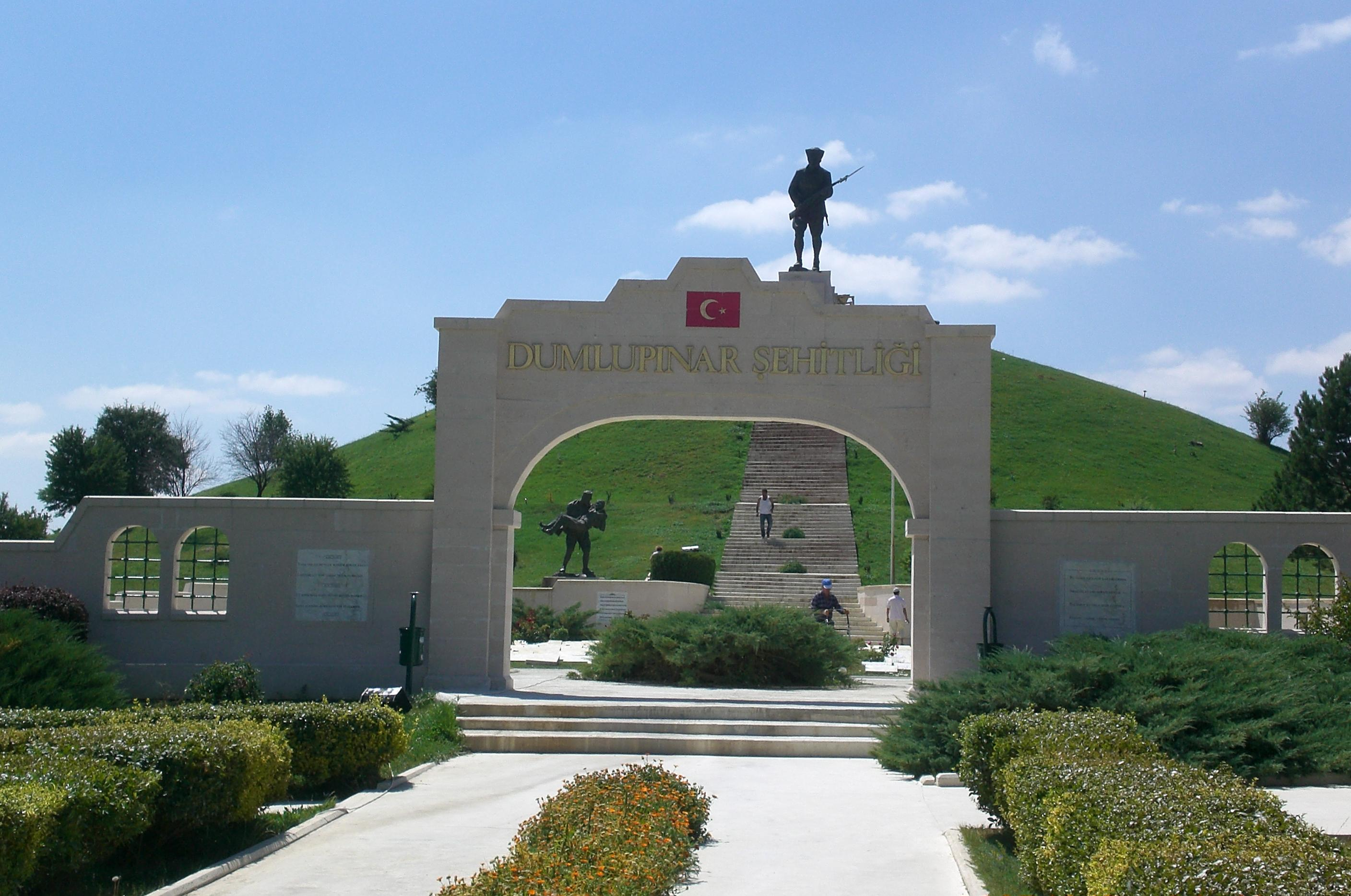 Dumlupınar şehitliği girişi